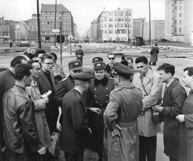 ADN-ZB-27.10.1961-Berlin: Durchsetzung der Grenzsicherungsmaßnahmen vom 13.8.1961. Am 26.10.1961 verhandelten an der Staatsgrenze in der Friedrichstraße Vertreter der in Westberlin stationierten amerikanischen Besatzung mit Offizieren der Volkspolizei über die Verfahrensweise beim Passieren der Staatsgrenze der DDR in Berlin durch Angehörige der US-Mission und der amerikanischen Besatzung.